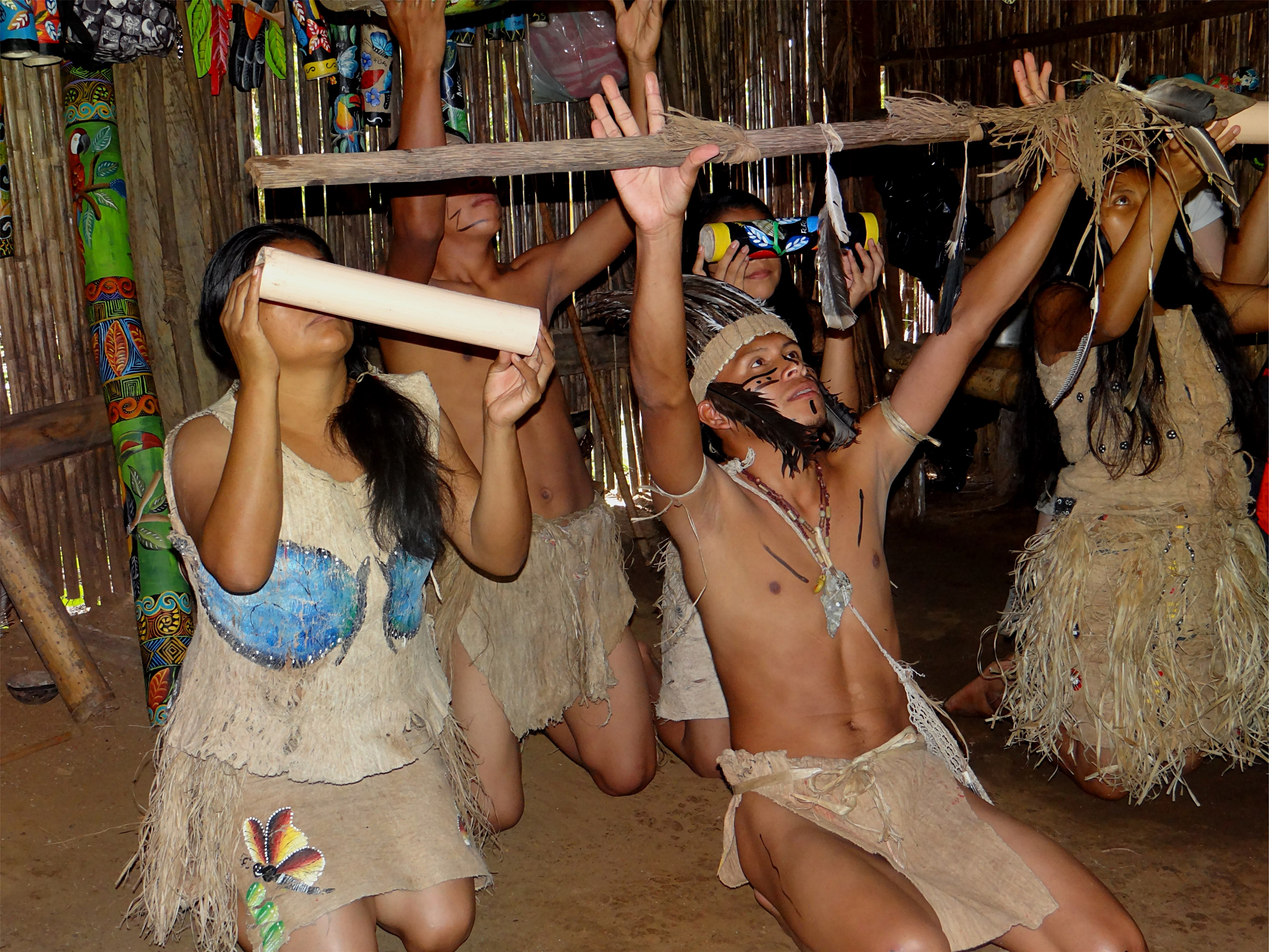 Cérémonie "Dieu, nature et homme", Palenque Tonjibe (village), région de Guatuso, Costa Rica.